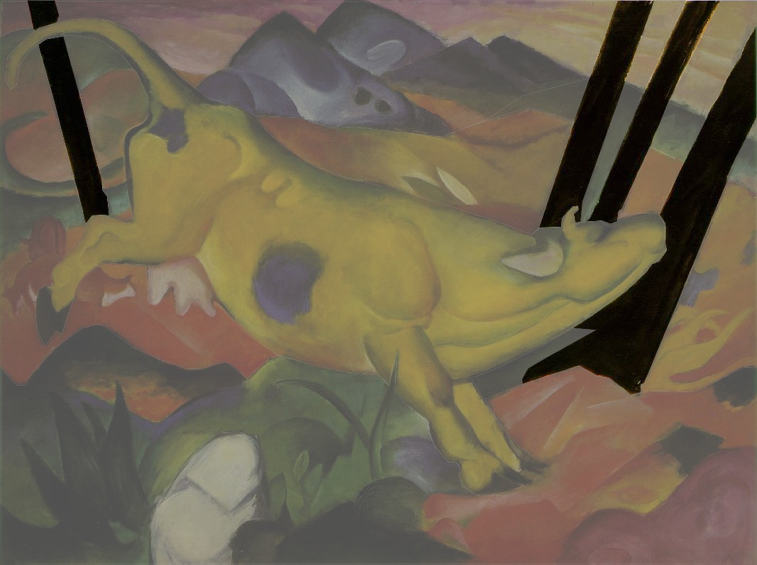 Bearbeitung von Datei:Franz Mark-The Yellow Cow-1911.jpg, Mittelgrund freigestellt